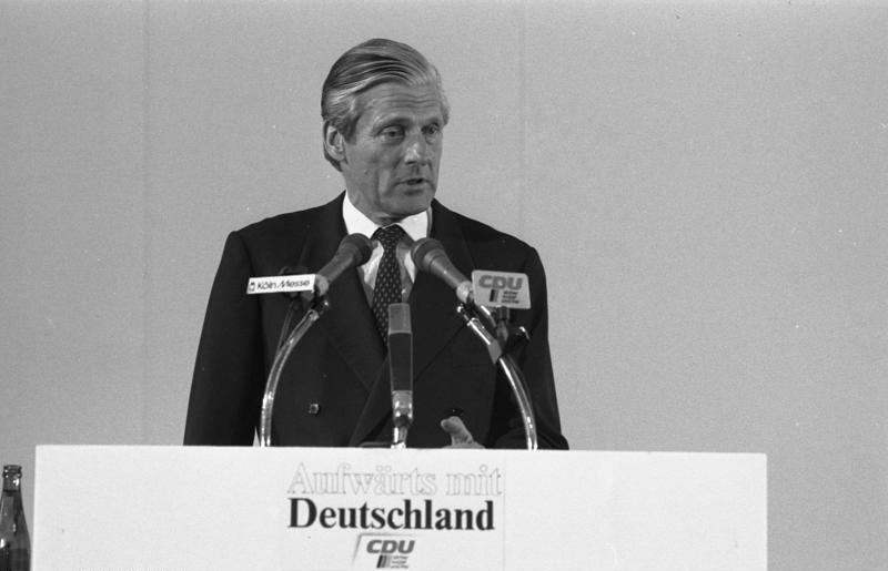 25.5.1983 31. Bundesparteitag der CDU in der Congress-Halle 8 der Kölner Messe.